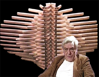 Portrait de Vincent Batbedat